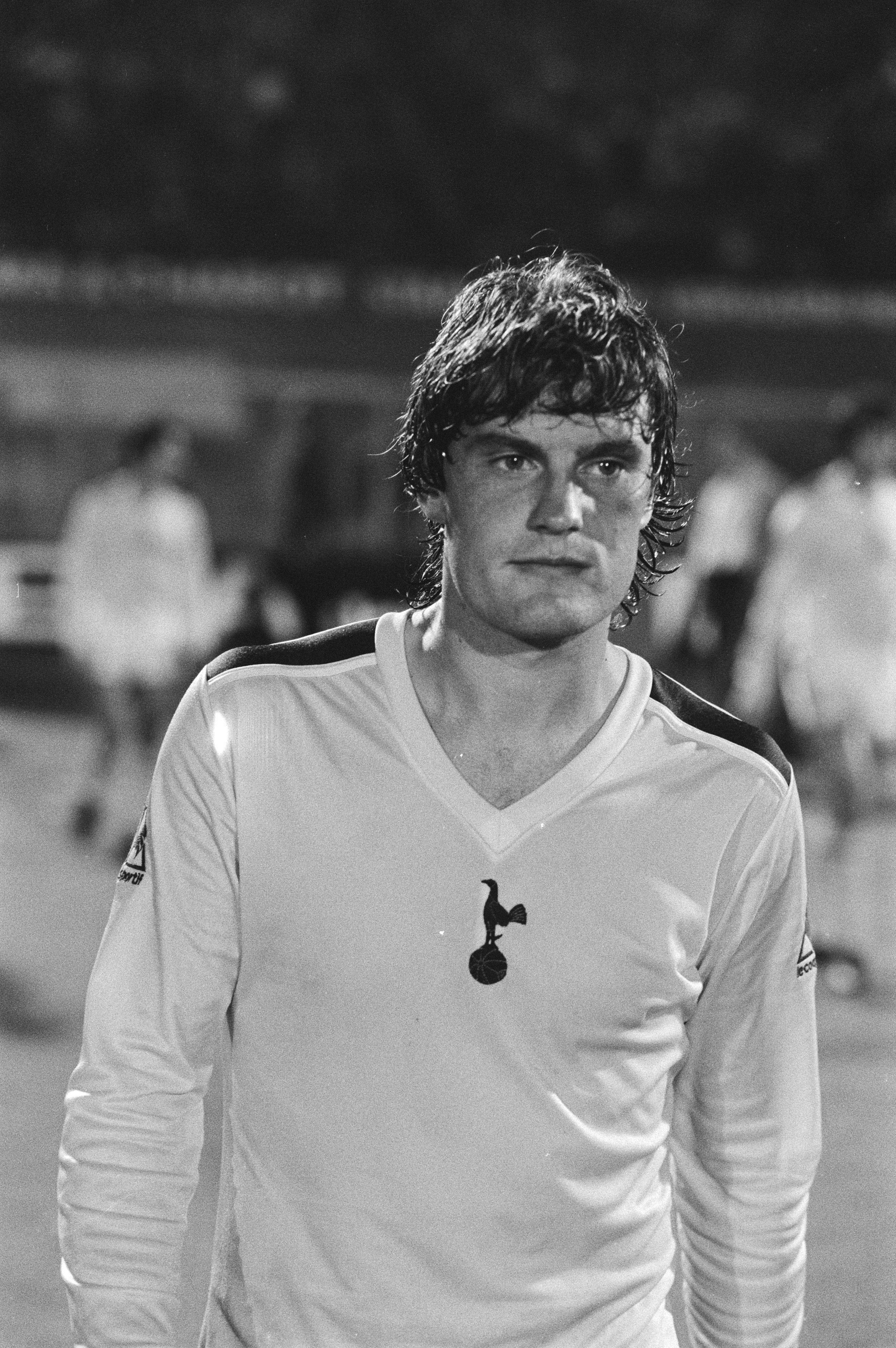 Collectie / Archief : Fotocollectie Anefo Reportage / Serie : Voetbal Ajax tegen Tottenham Hotspur 1-3 Beschrijving : Glenn Hoddle Datum : 16 september 1981 Locatie : Amsterdam, Noord-Holland Trefwoorden : portretten, sporten, voetballers Fotograaf : Antonisse, Marcel / Anefo Auteursrechthebbende : Nationaal Archief Materiaalsoort : Negatief (zwart/wit) Nummer archiefinventaris : bekijk toegang 2.24.01.05 Bestanddeelnummer : 931-6858